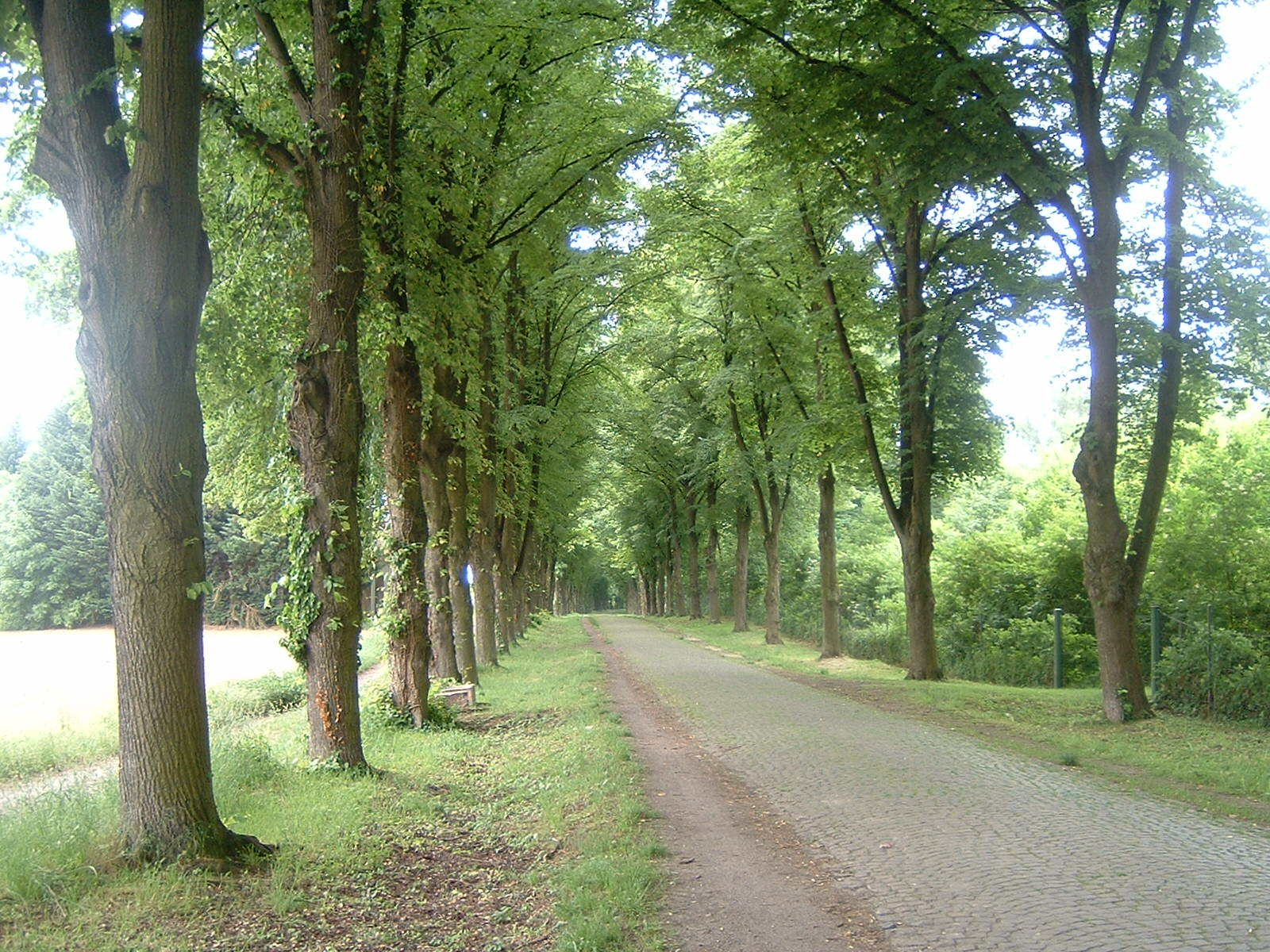 Wasserwerkallee in Hattersheim am Main, errichtet 1903, Kopfsteinpflaster, Linden